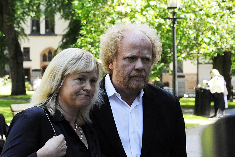 Staffan Götestam at the funeral of Magnus Härenstam at Hedvig Eleonora Church, Stockholm.